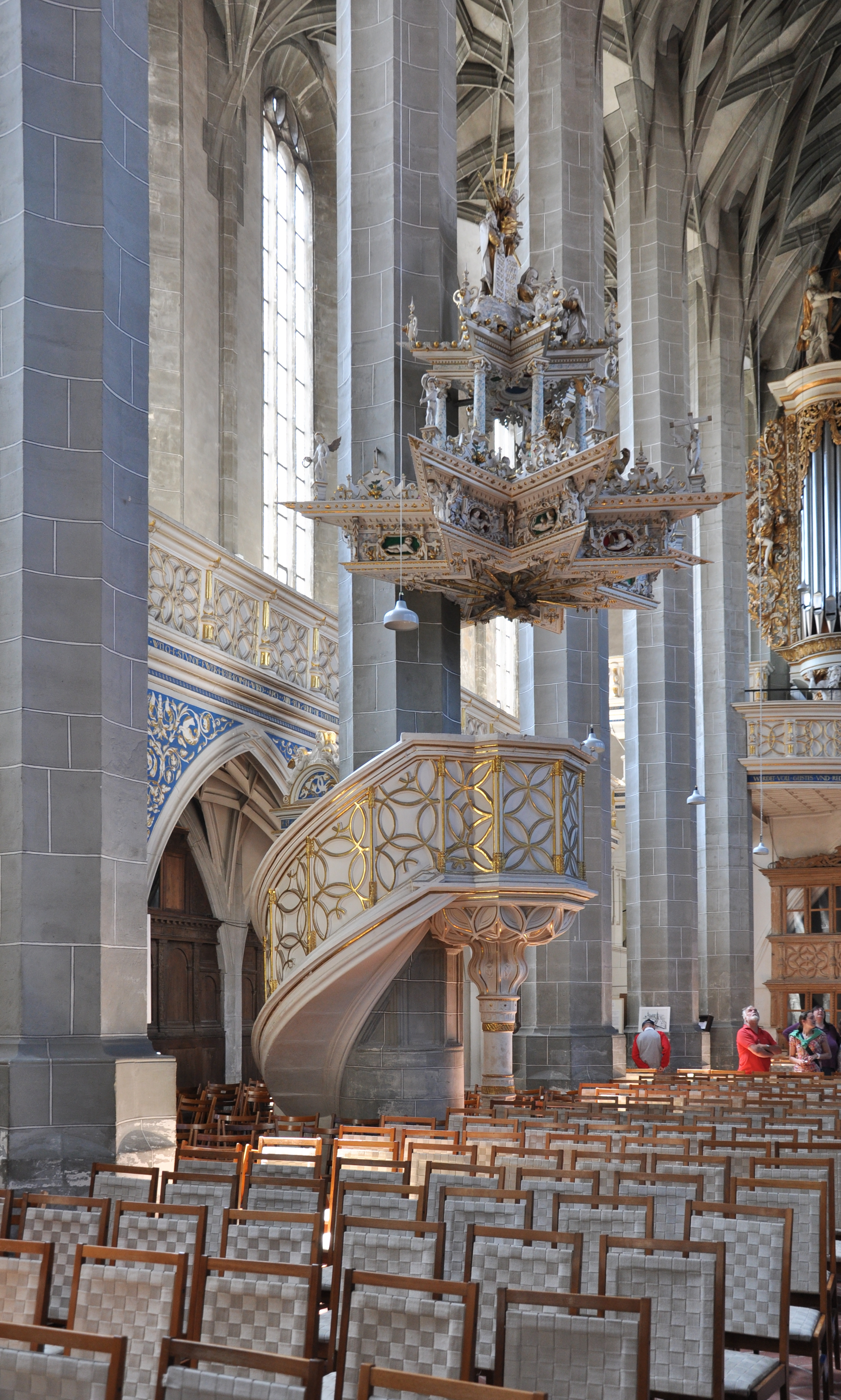 Halle (Saale), Marktkirche